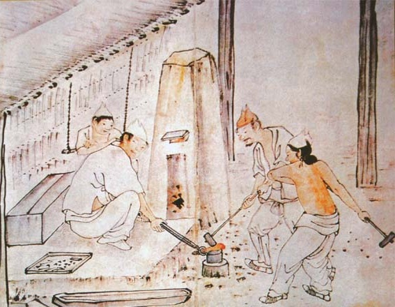 Dat Bild De Smeed von'n koreaanschen Maler Kim Duk-sin